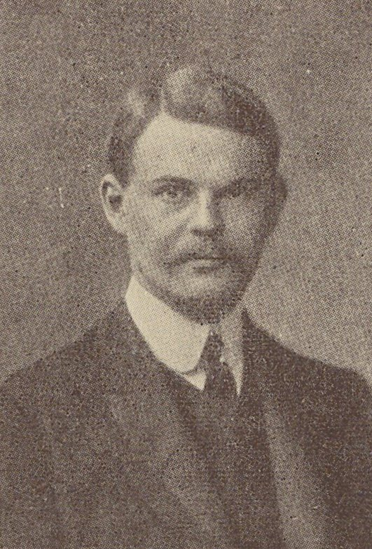 Partoprenantoj de UK 1912 el la albumo VIII. Universala Kongreso Esperantista.